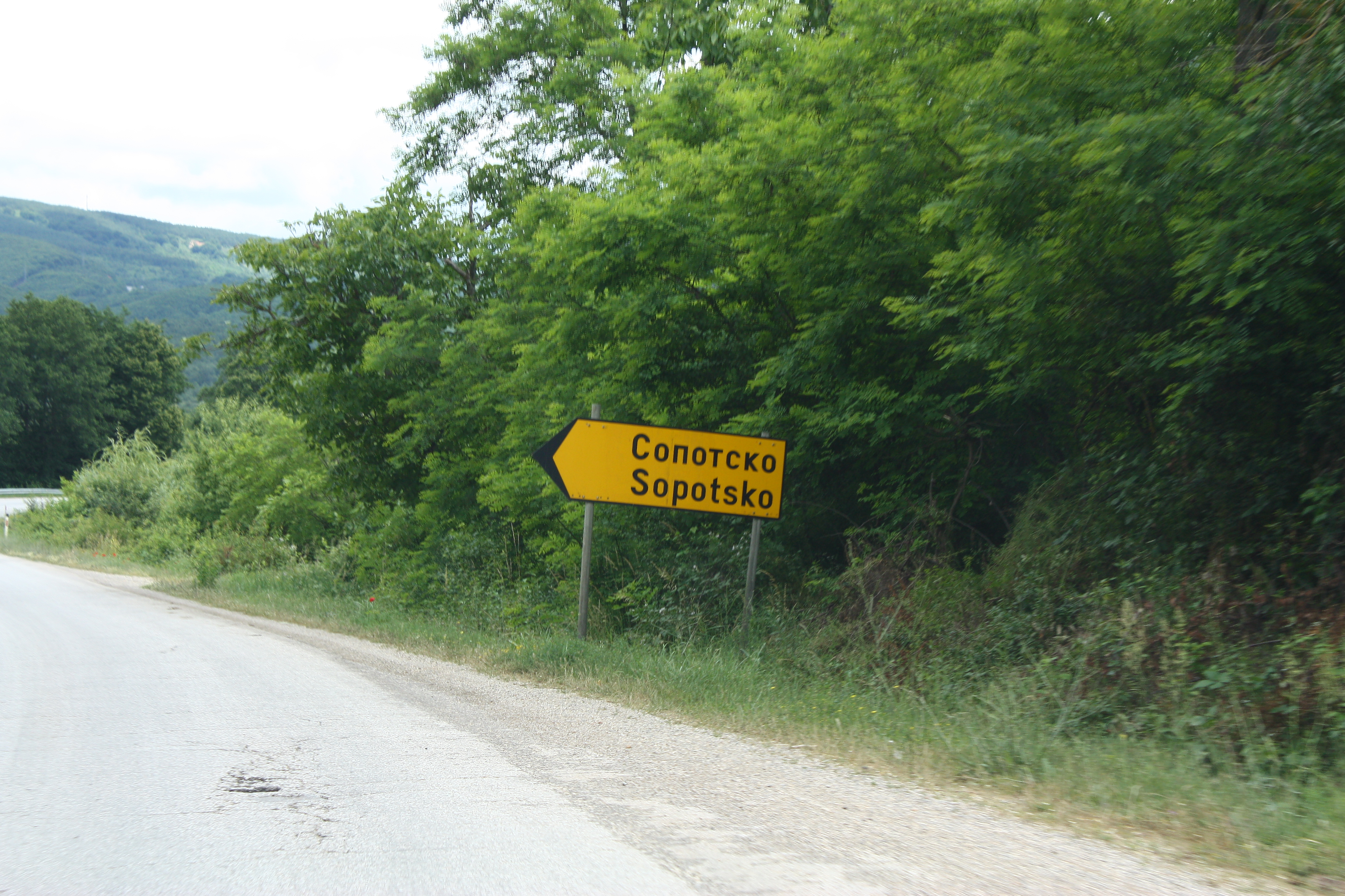 Sopotsko, Macedonia